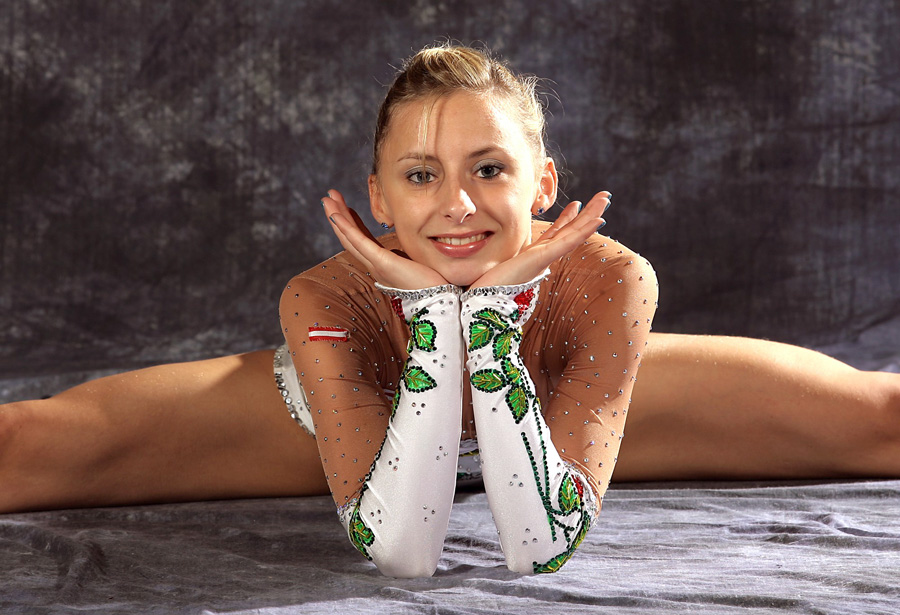 Die Rhythmische Gymnastin Caroline Weber von der TS Dornbirn aus Vorarlberg/Österreich.